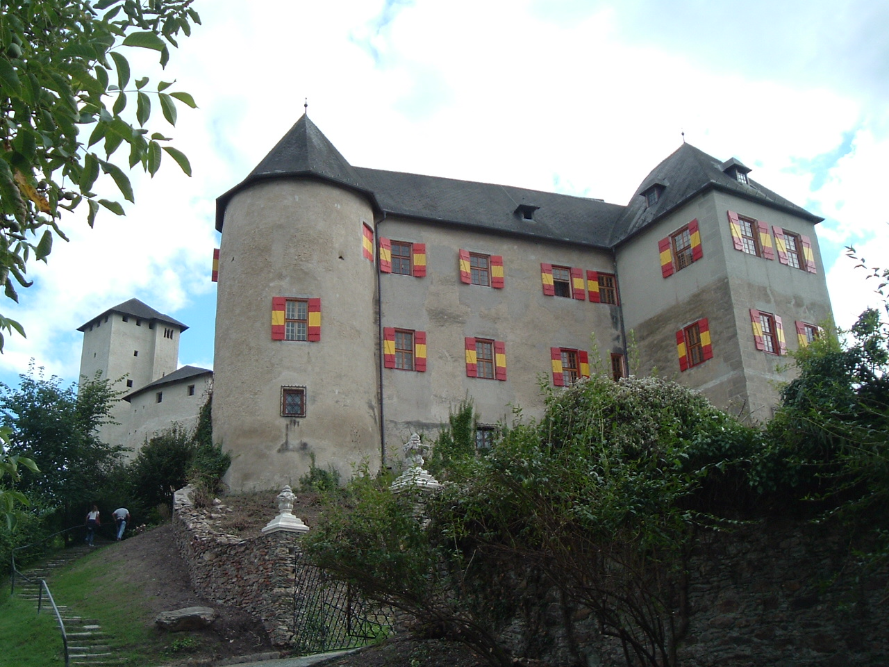 Castle of Lockenhaus, Burgenland, Austria